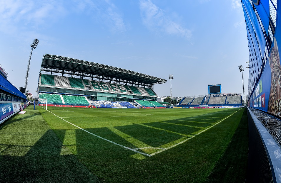 Leo Stadium